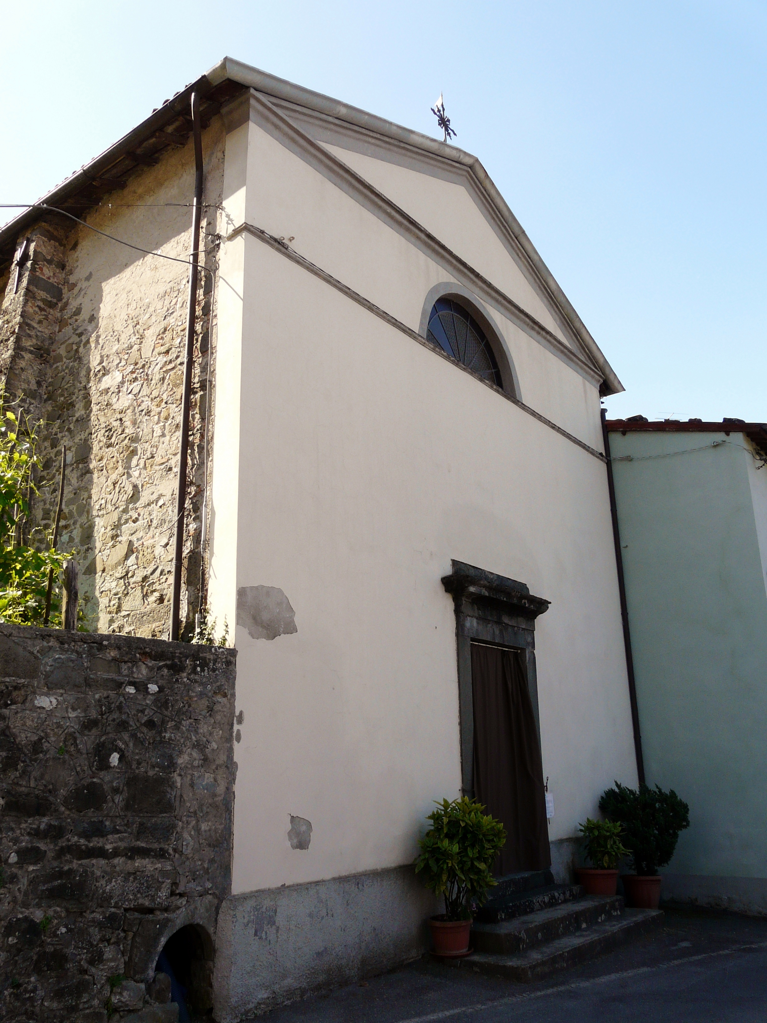 Chiesa a Fosciandora, Toscana, Italia